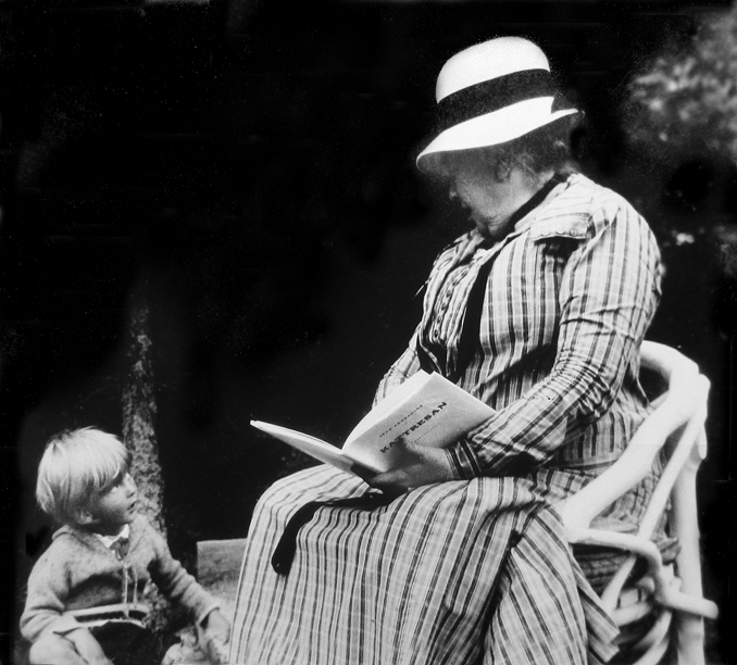 Gunnar Frieberg ca 1932 lyssnar på farmor som läser Kattresan.